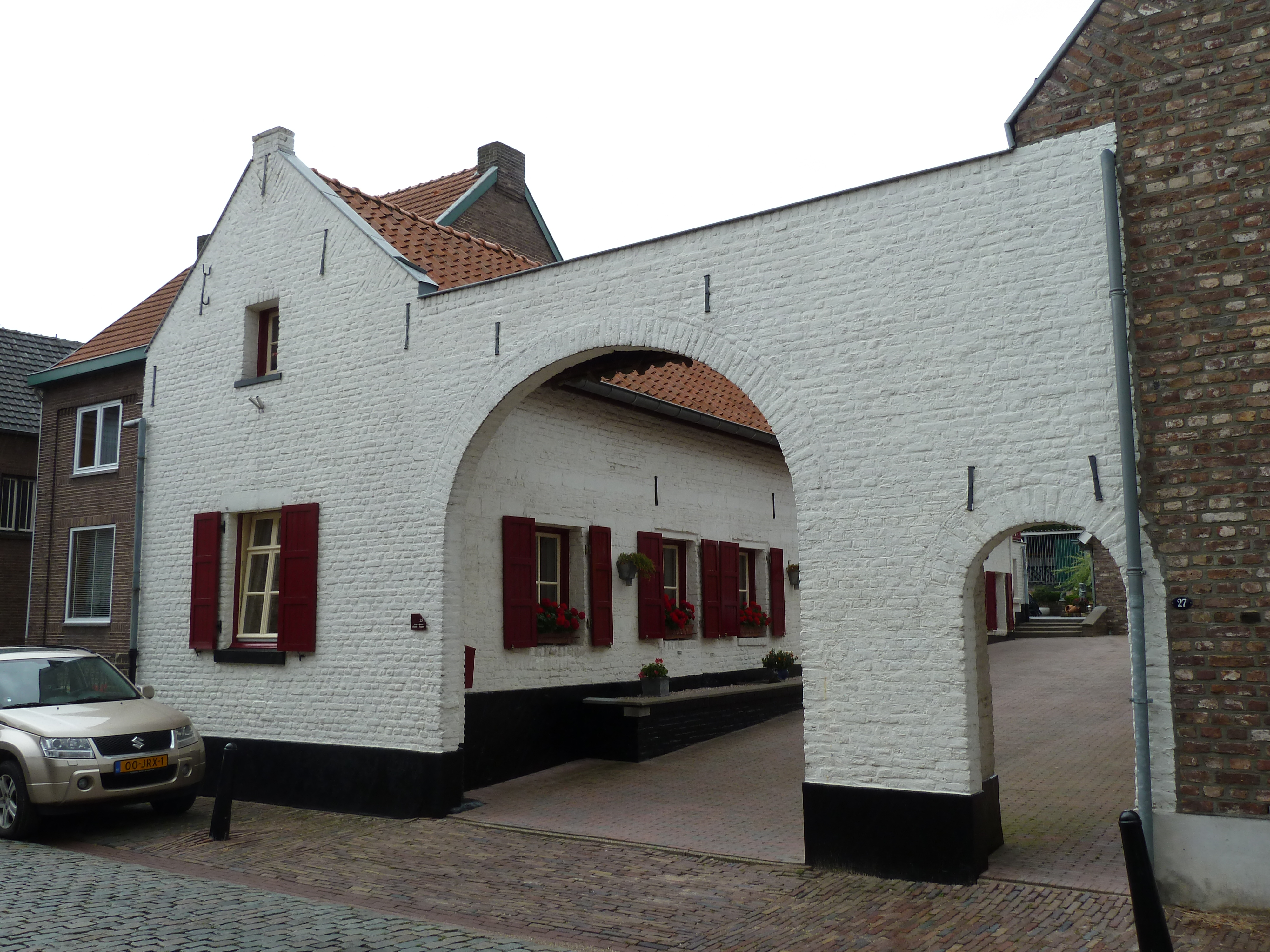 Dorpstraat 25, Elsloo, Limburg, Nederland